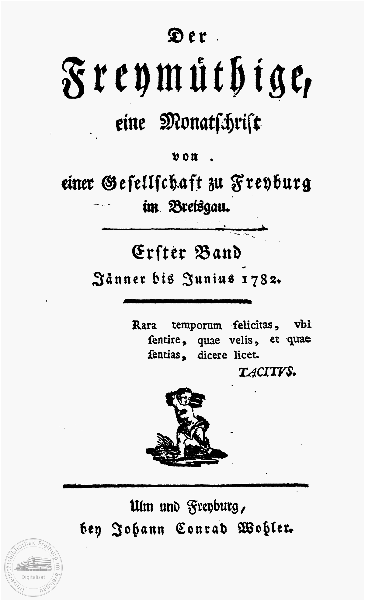 Erste Seite des ersten Bandes der Zeitschrift Der Freymuethige